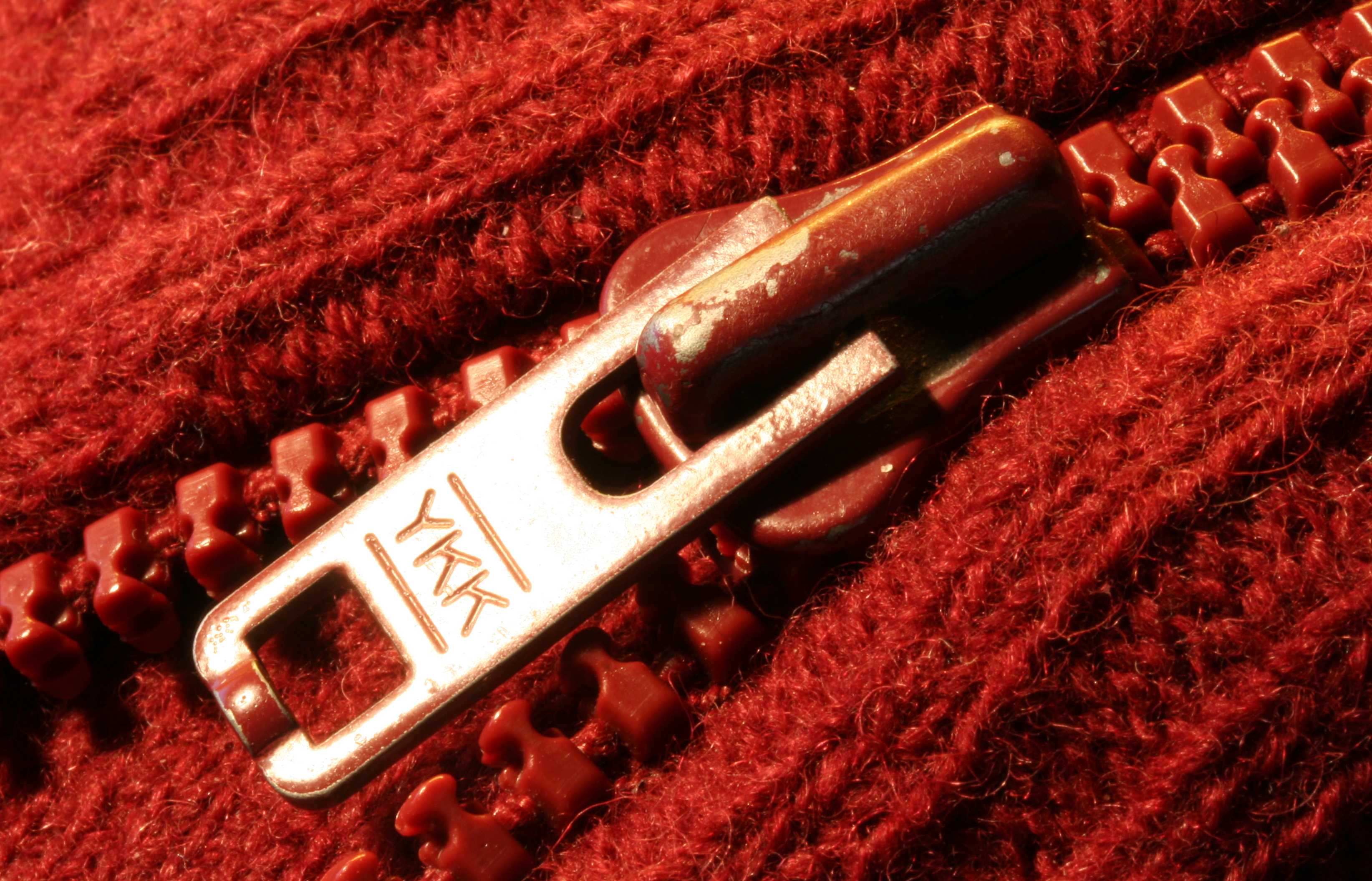 YKK_Tirett.